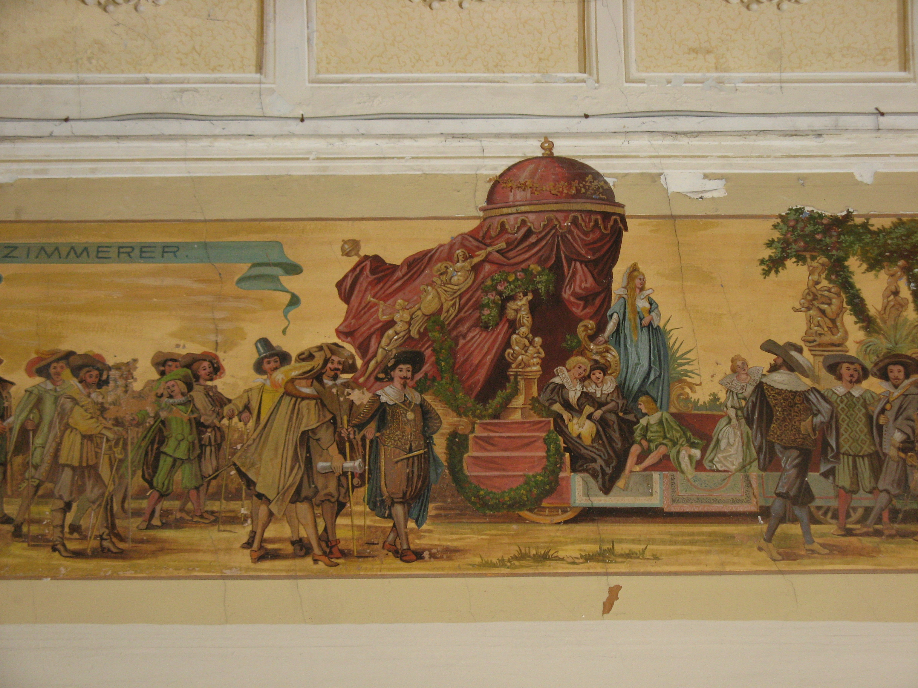 Historisches Handwerkerumzug, Wandmalerei, Favoritenstraße 174, Wien-Favoriten